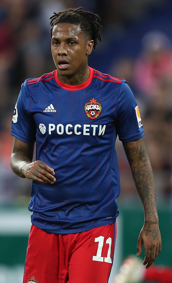 «Ростов» впервые за 9 лет обыграл ЦСКА в гостях